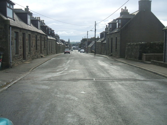 Main street, New Deer, Aberdeenshire